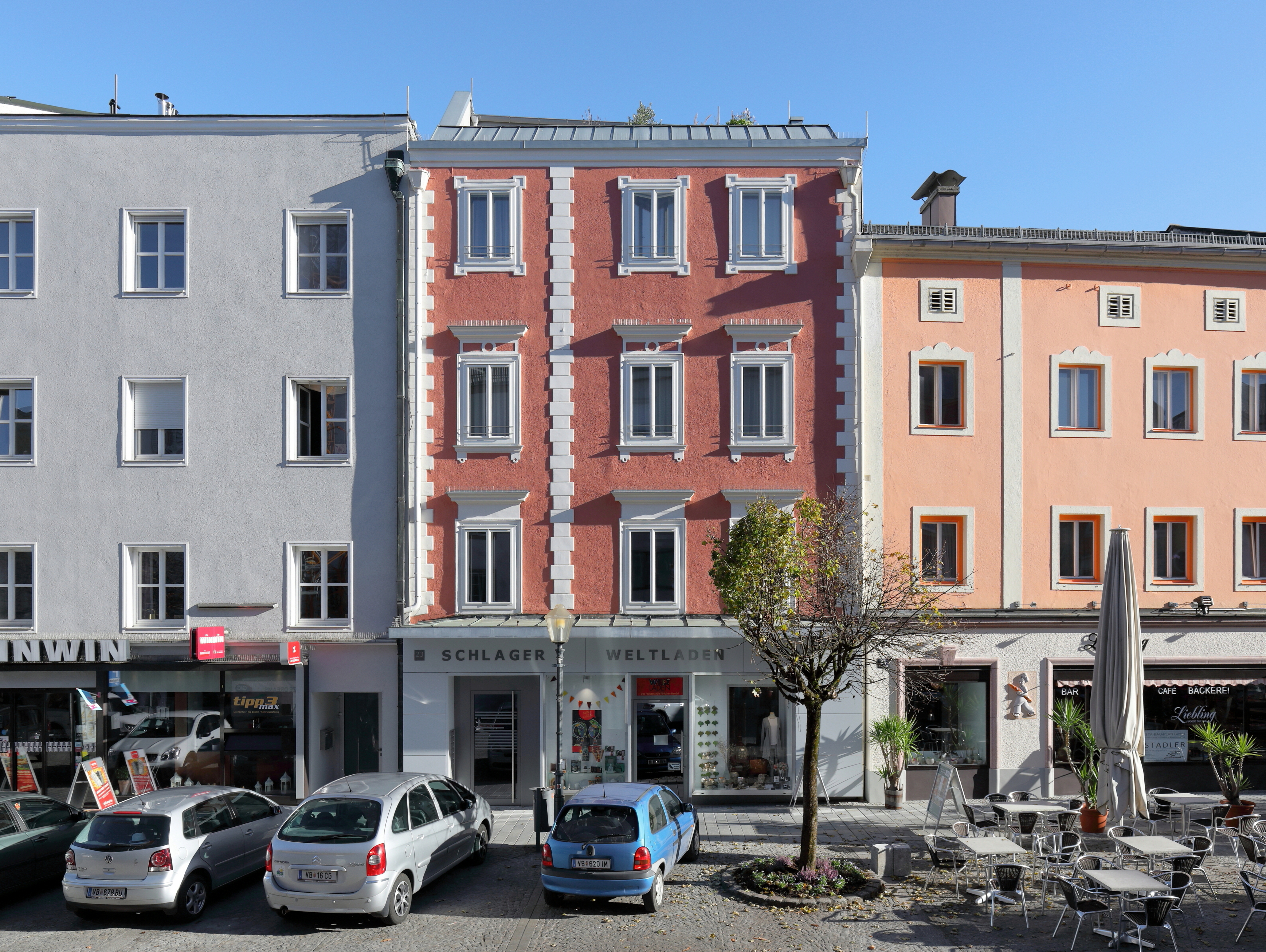 Das denkmalgeschützte Bürgerhaus an der Adresse Stadtplatz 23 in der oberösterreichischen Bezirkshauptstadt Vöcklabruck.